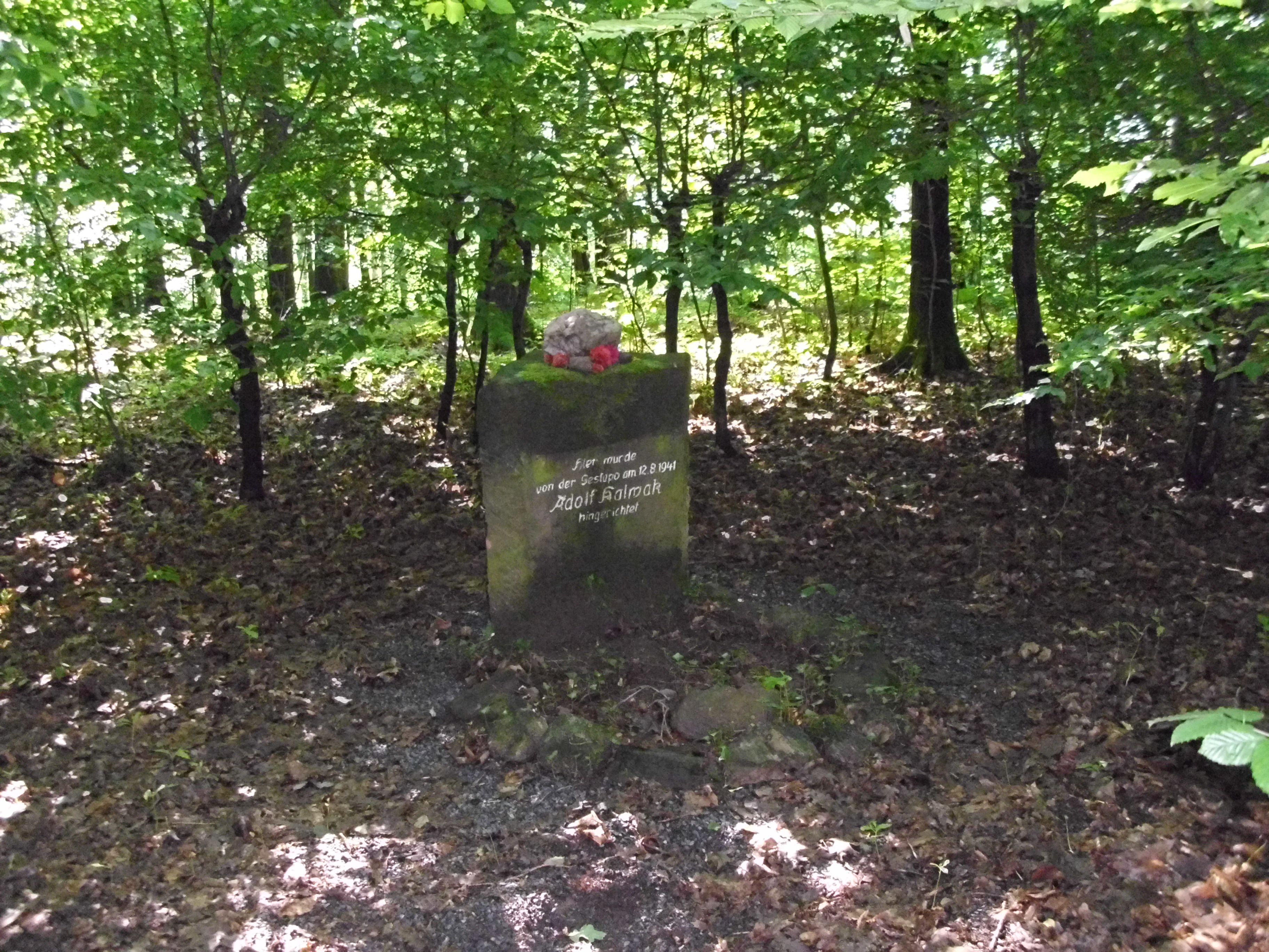 Hier wurde ein Zwangsarbeiter, dem die Liebe zu einer Einheimischen zum Verhängnis wurde, erschossen.